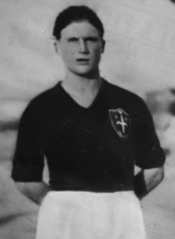 Il calciatore della Triestina Renato De Manzano Foto tratta da "Domenica Sportiva" del 18 giugno 1933 pubblico dominio